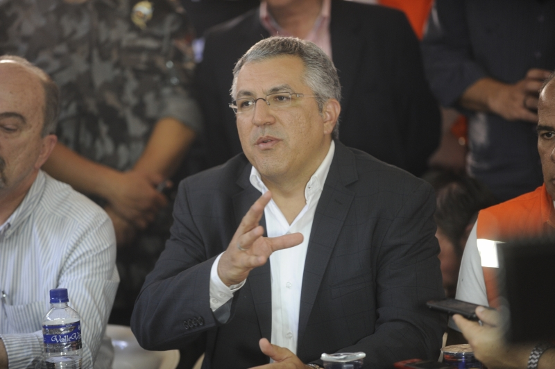 O ministro da Saúde, Alexandre Padilha, anuncia atendimento aos feridos do incêndio na Boate Kiss, na madrugada de hoje (27).